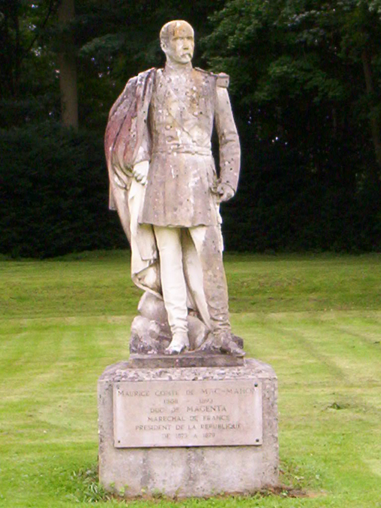 Statue de Patrice de Mac Mahon au château de Sully